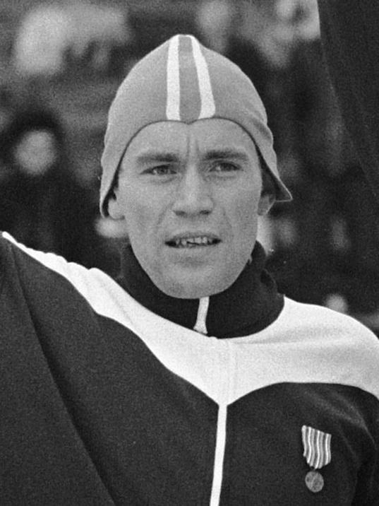 Wereldkampioenschappen Schaatsen te Gotenburg. 1500m Bjørn Tveter